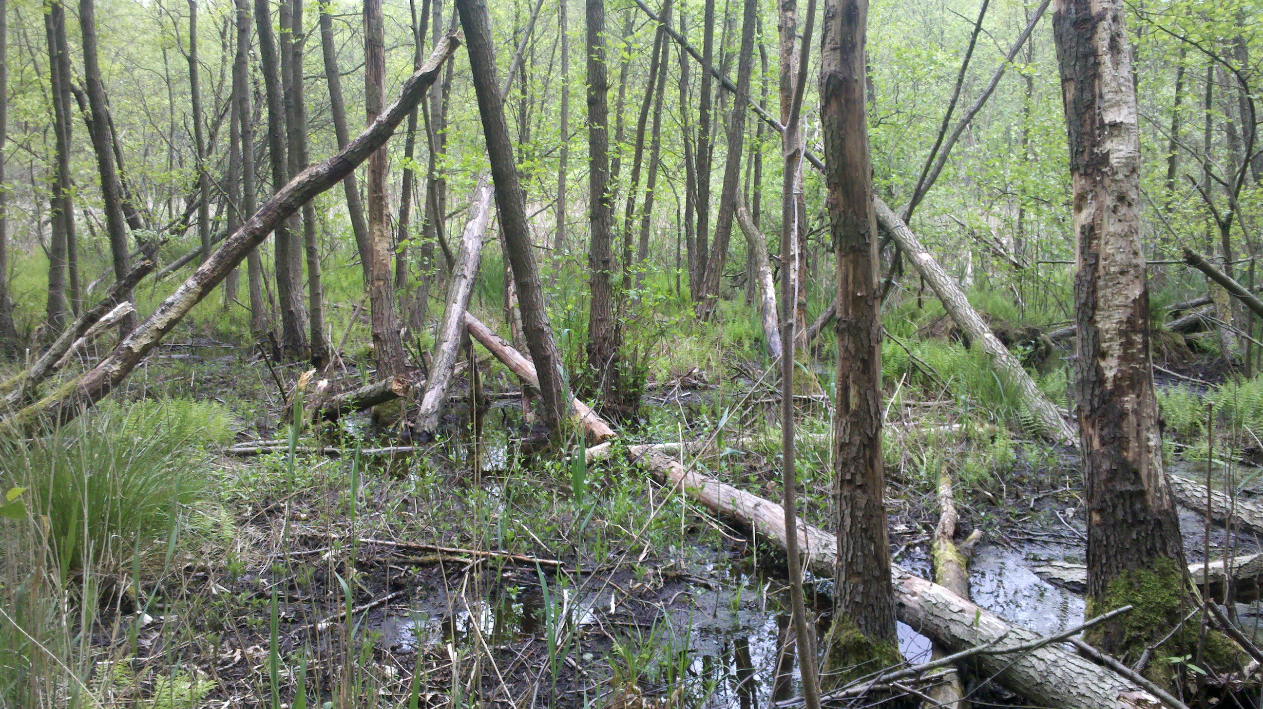 Böhmerheide, Schorfheide: Der fast vollständig verlandete Papensee